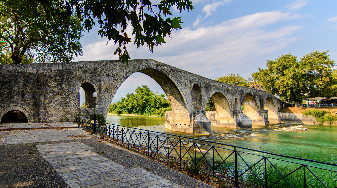 Γεφύρι της Άρτας«Γεφύρι της Άρτας»